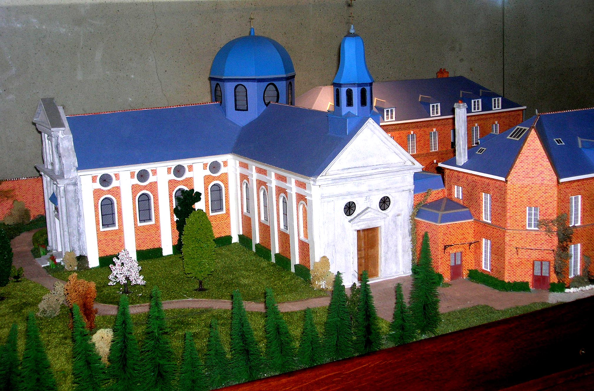 E Modell vum Carmel zu Lisieux (2006) Source: Eegen Opnam vum user ernmuhl